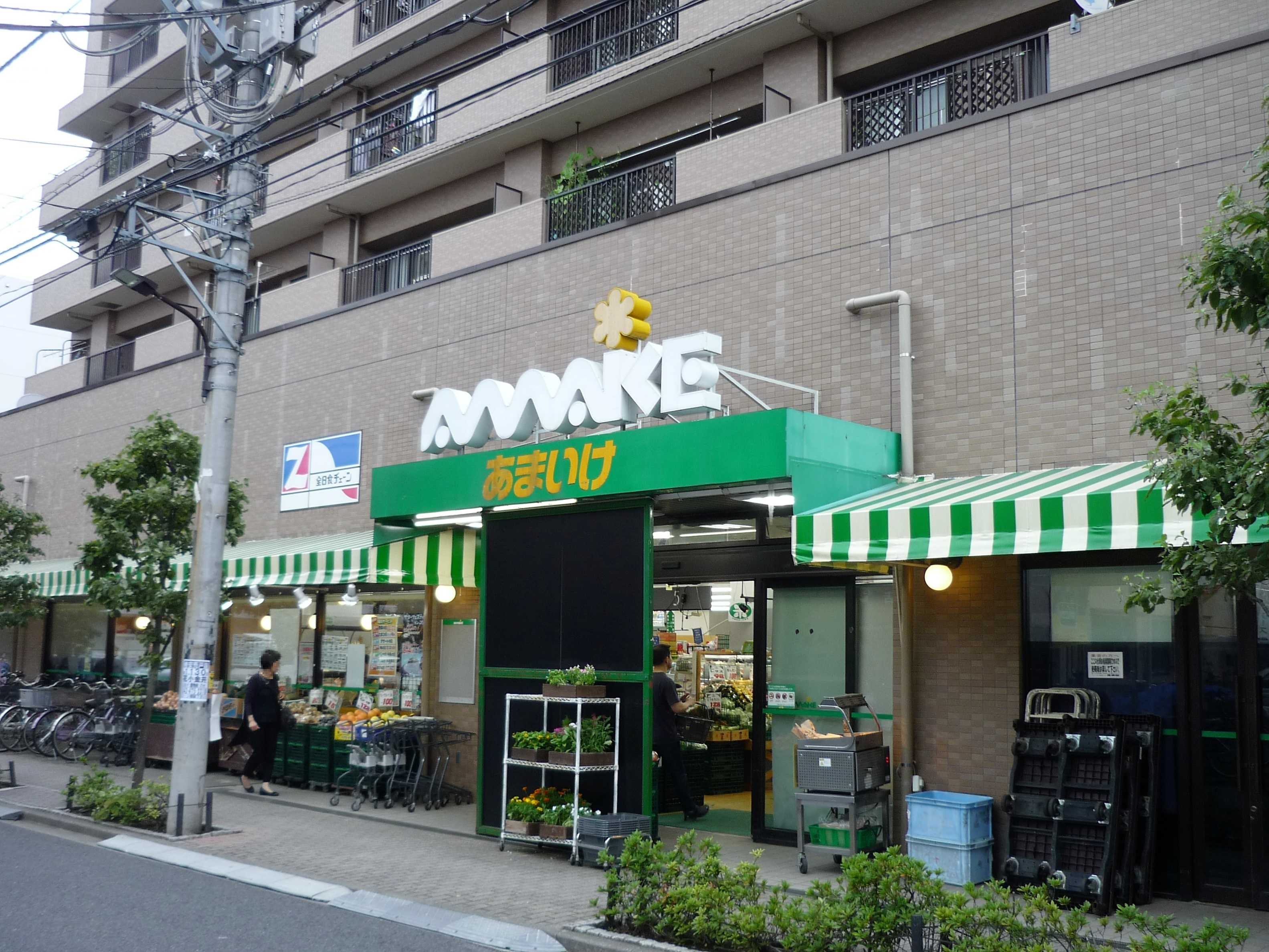 スーパーあまいけ 小平店